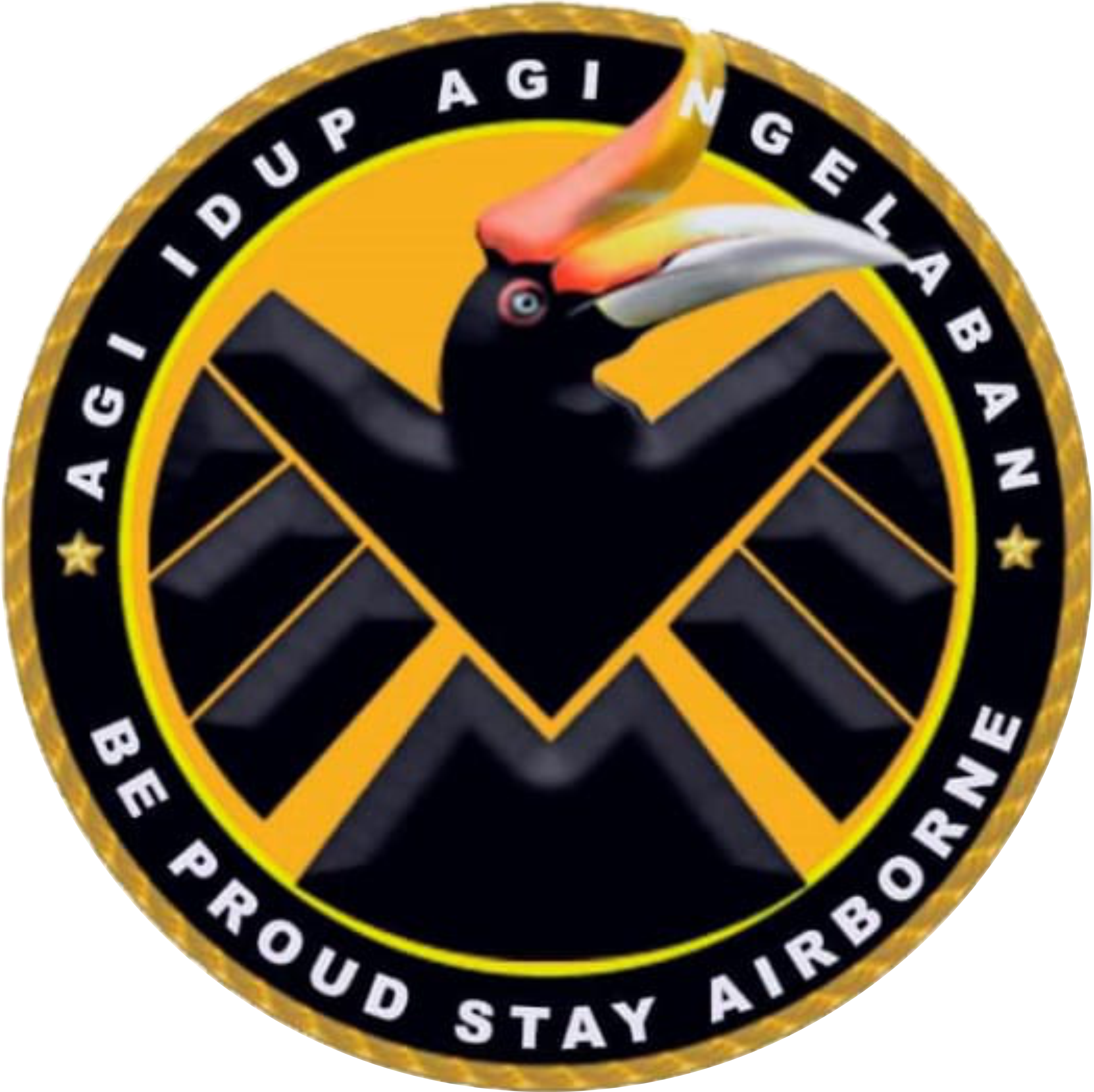 EMBLEM 8 RRD (Para)